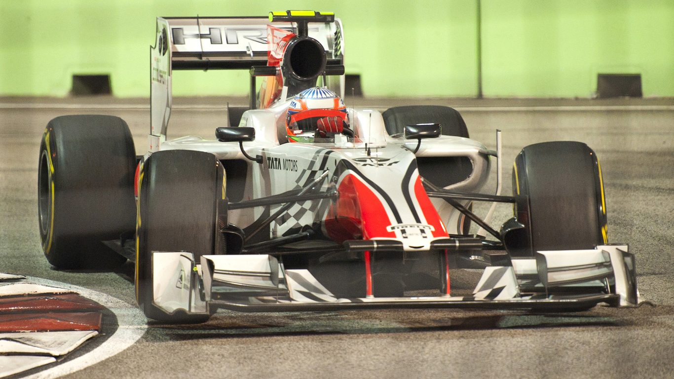 Narain Karthikeyan, friday test